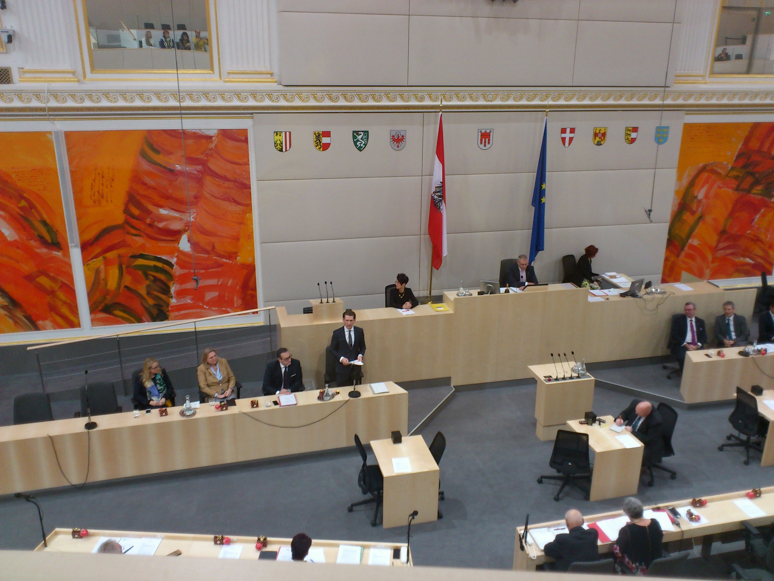 Österreich: im Bundesrat gibt der neue Bundeskanzler Sebastian Kurz seine Regierungserklärung ab. Der Bundesrat tagt im Redoutensaal, weil das Parlamentsgebäude renoviert wird.